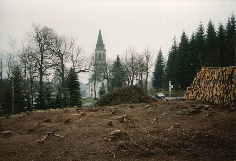 Blick zum Marktplatz und zur Kirche in Johanngeorgenstadt